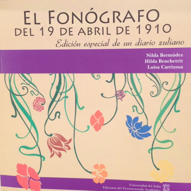 Portada del libro dedicado al análisis de la edición especial del 19 de abril de 1910, del diario zuliano "El Fonógrafo" de Maracaibo. Estado Zulia, Venezuela. Autoras: Nilda Bermúdez, Hilda Benchetrit y Luiza Carrizosa.